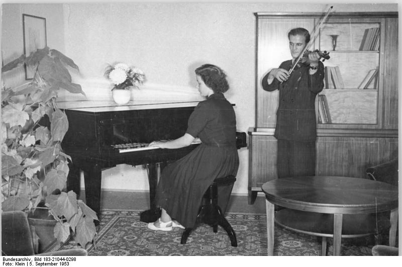 Musikzimmer, VEB Möbelwerke Eilenburg Zentralbild Klein 5.9.1953 Leipziger Messe1953 UBz: Ein vom Kollektiv Sachsenholz entworfenes und vom VEB Qualitäts-Möbelwerke Eilenburg hergestelltes Musikzimmer.